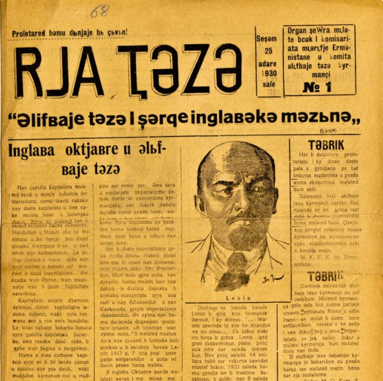 Риа таза